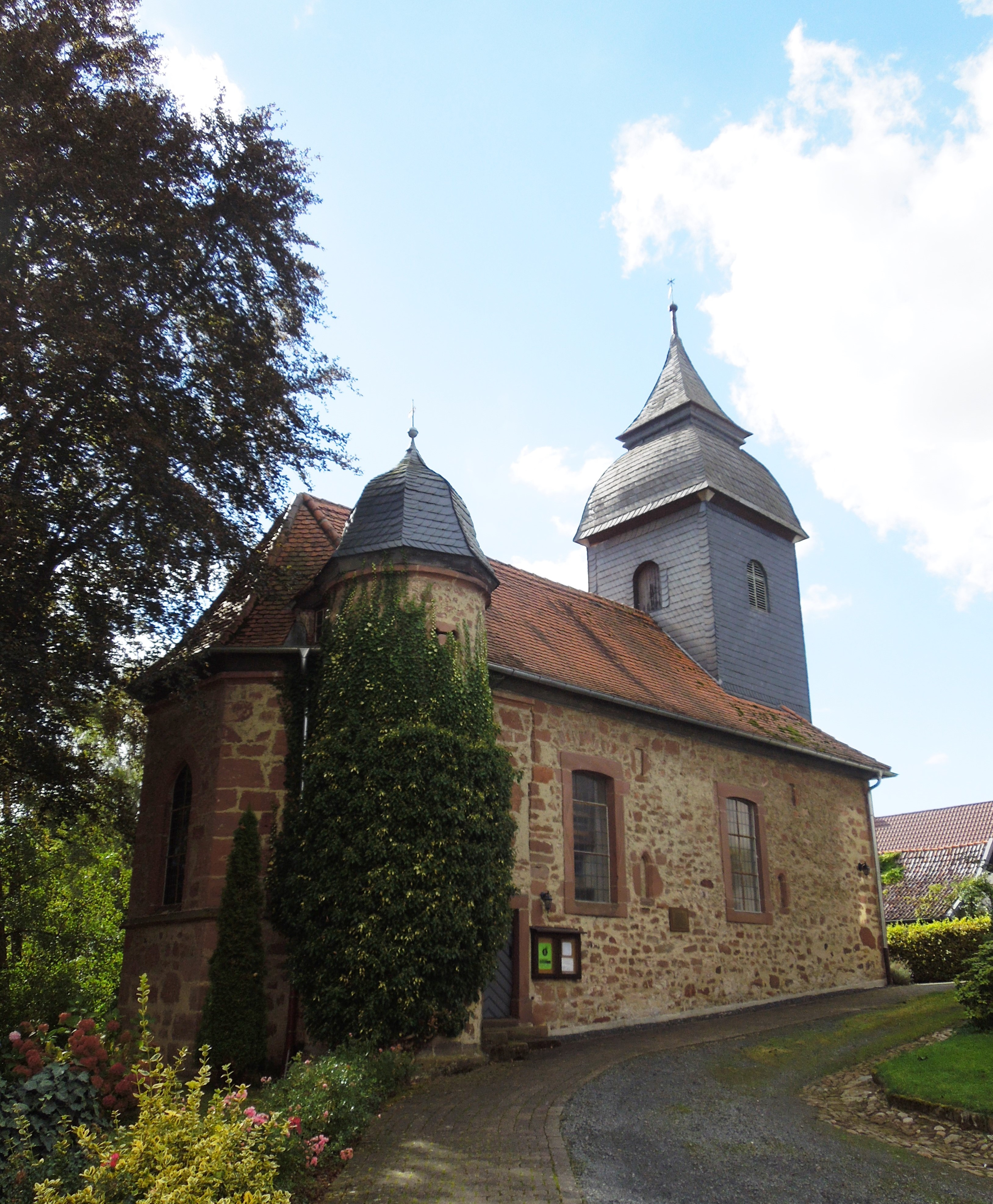 Die Kirche in Bischhausen